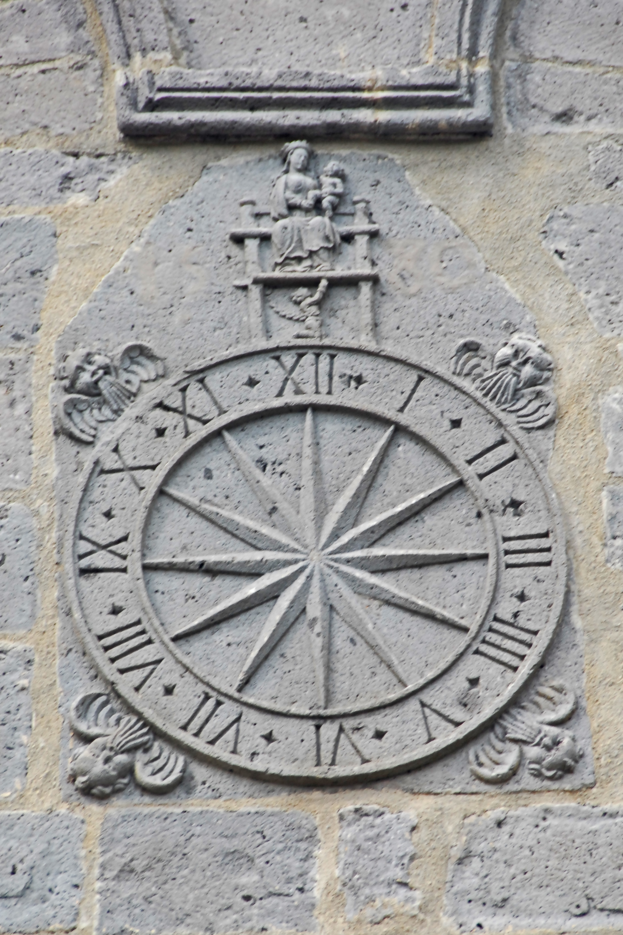 N.-D.d'Orcival, südl. Querhausarm, "Uhr"